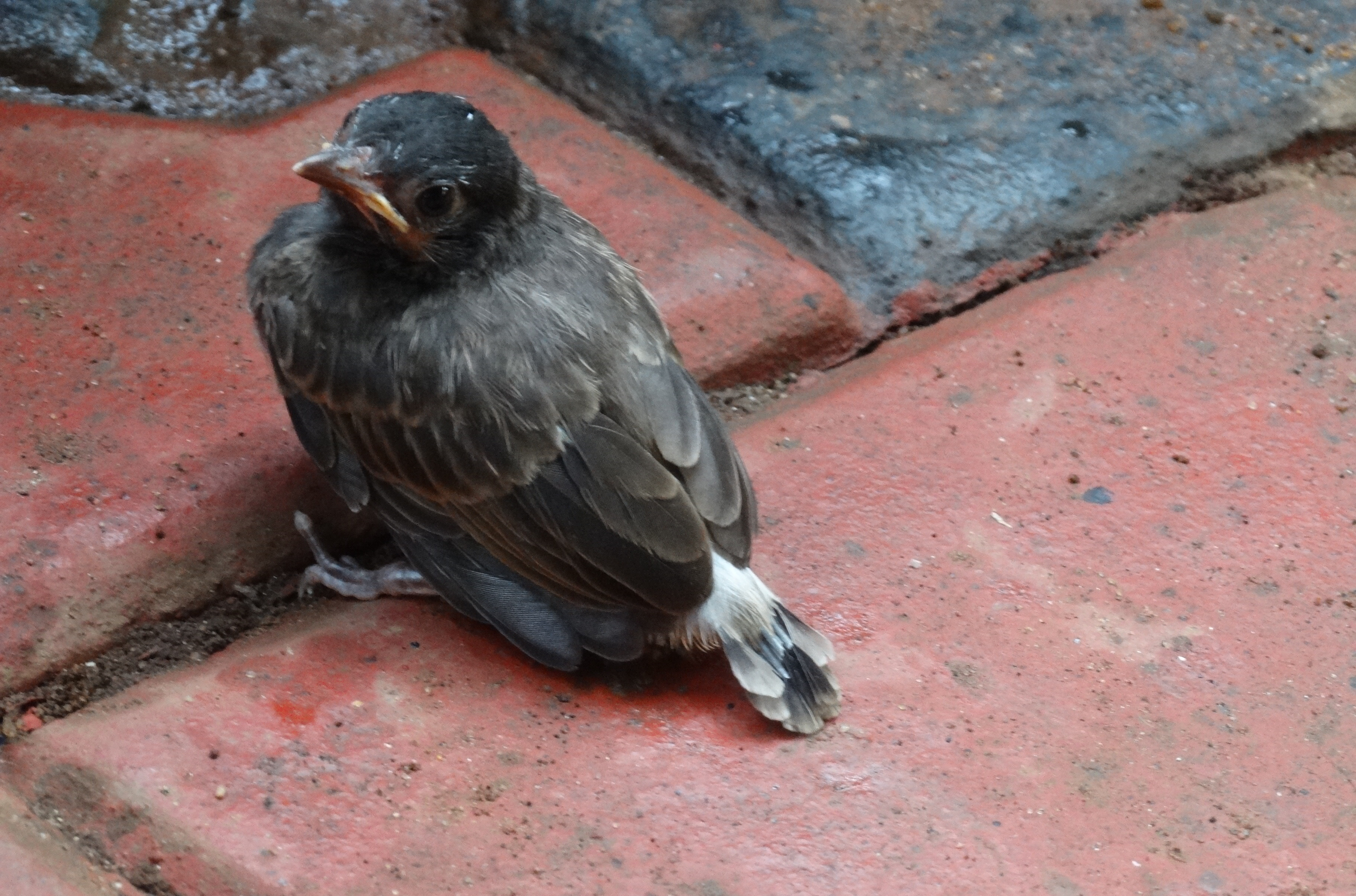 നാട്ടുബുൾബുളിന്റെ കുഞ്ഞ്